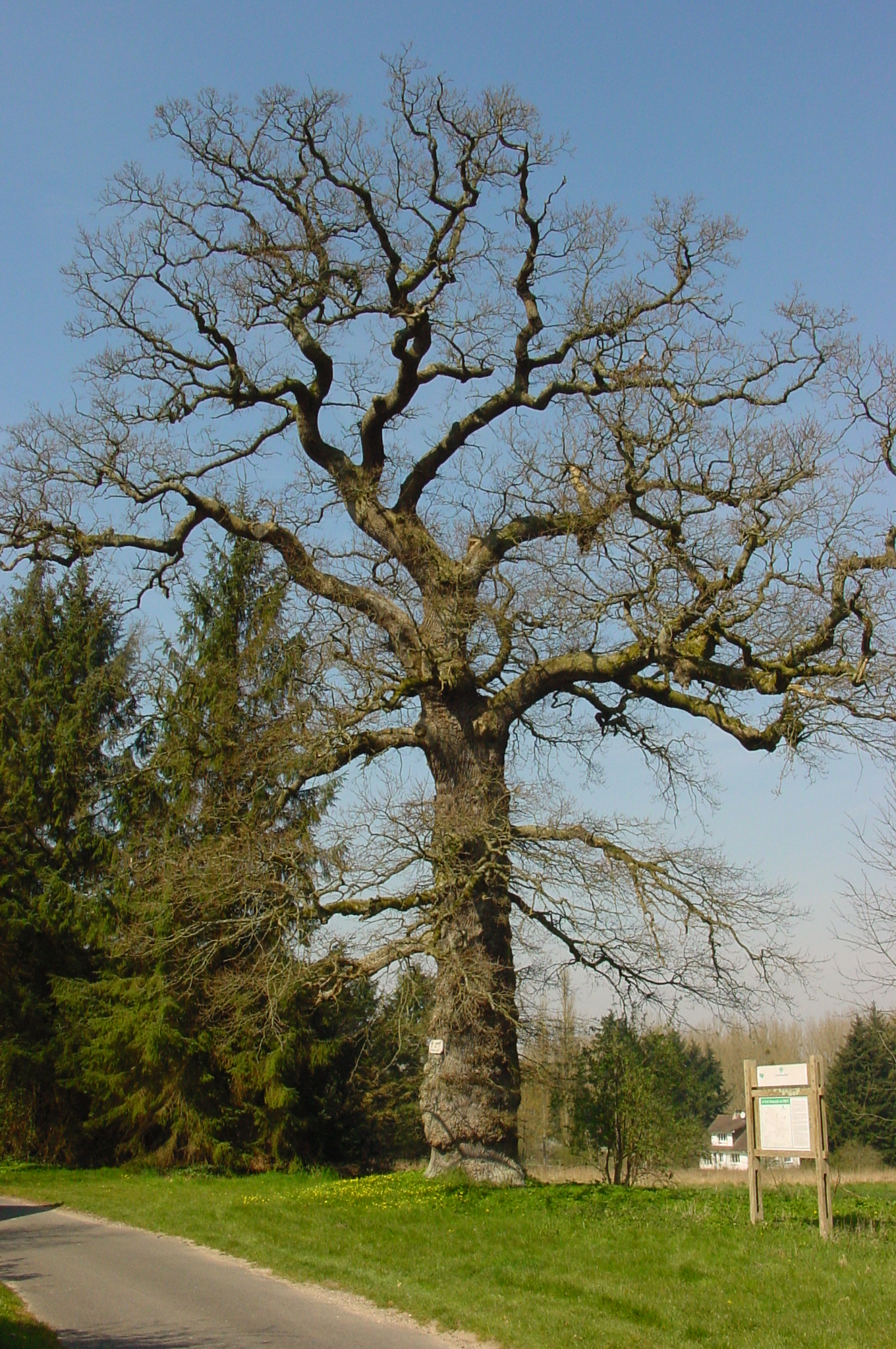 Chêne des Ramolleux, plusieurs fois centenaire (600 ans estimés), en lisière nord de la forêt de Crécy (Somme, France), en face de la maison forestière de Caumartin.